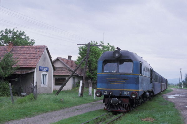 TU2-034 in Oleschnyk